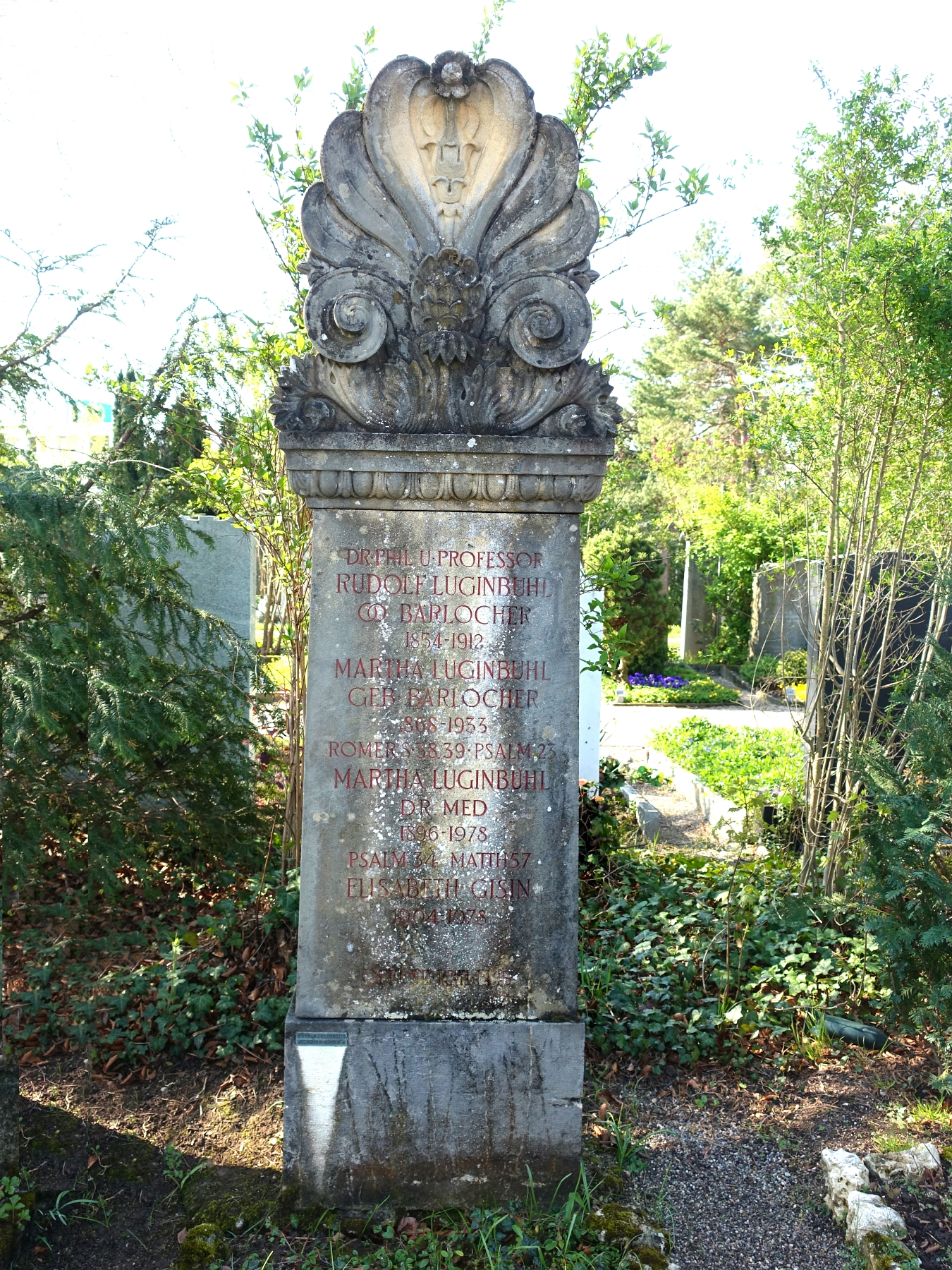 Rudolf Luginbühl-Bärlocher (1854–1912) Historiker. Professor an der Universität Basel. Autor von schweizerischen Lehrbüchern. Grab auf dem Friedhof Wolfgottesacker, Basel. Gestaltet von Isidor Raphael Pellegrini (1871–1954) Architekt und Bildhauer